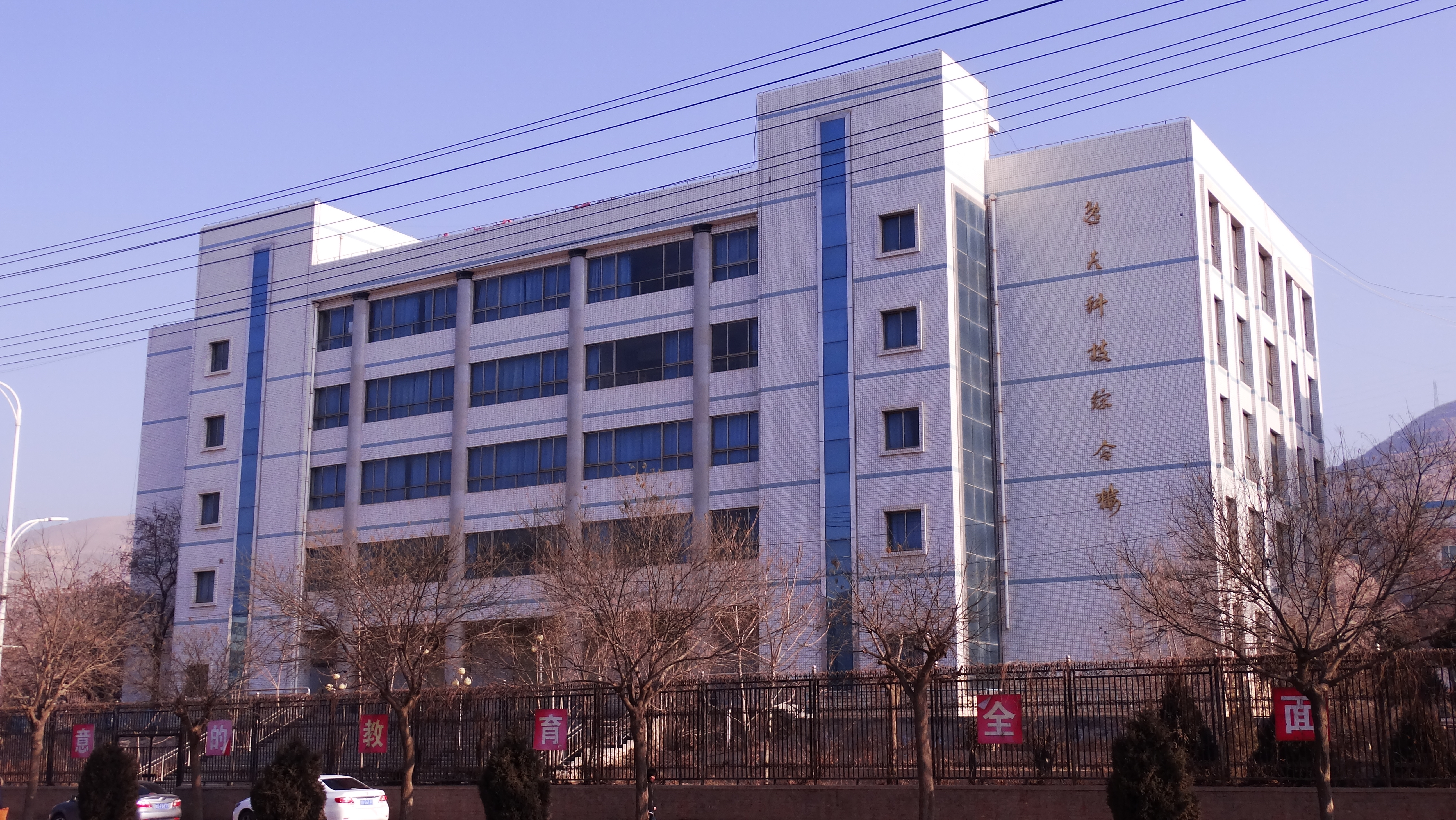 拍摄与中国甘肃会宁县会宁一中